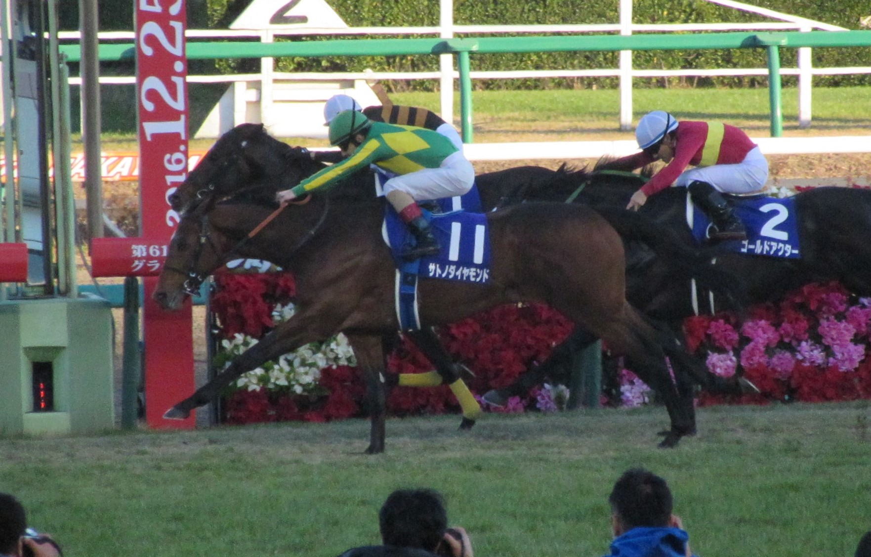 第61回有馬記念を勝ったサトノダイヤモンド